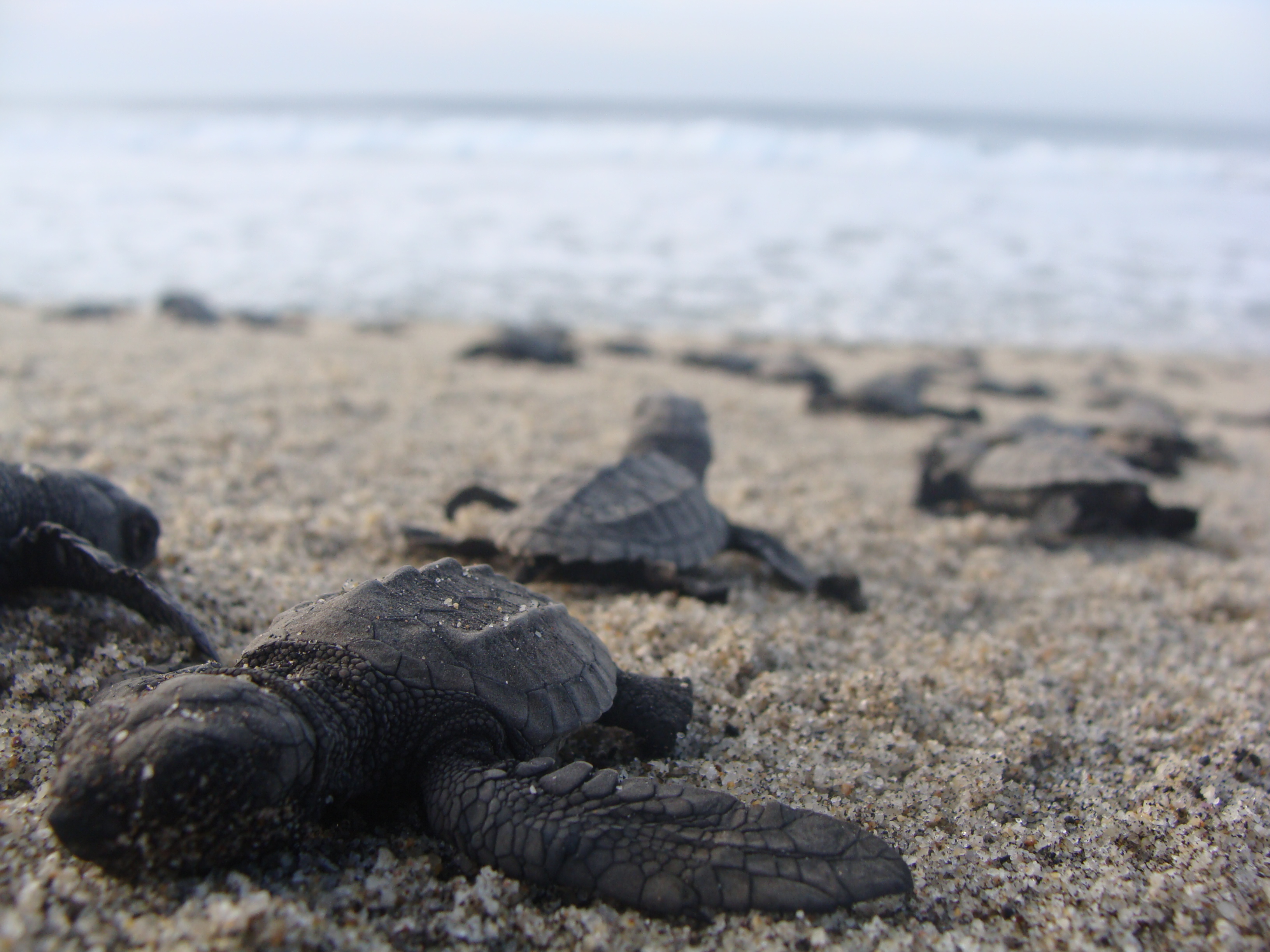 Crias de tortuga golfina, listas para enfrentar al mar. Oaxaca Mexico